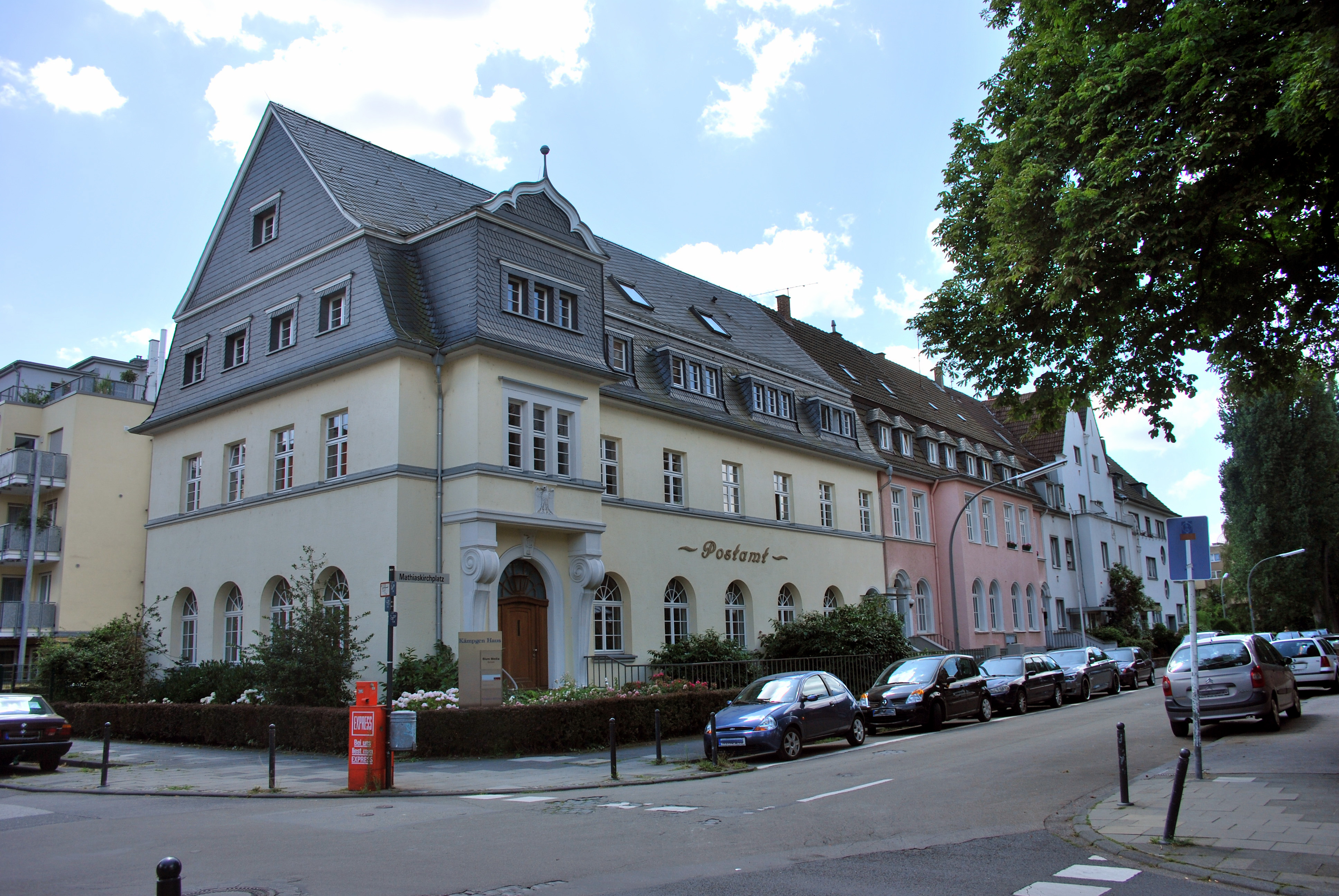 Alte Post Köln-Bayenthal This is a photograph of an architectural monument.